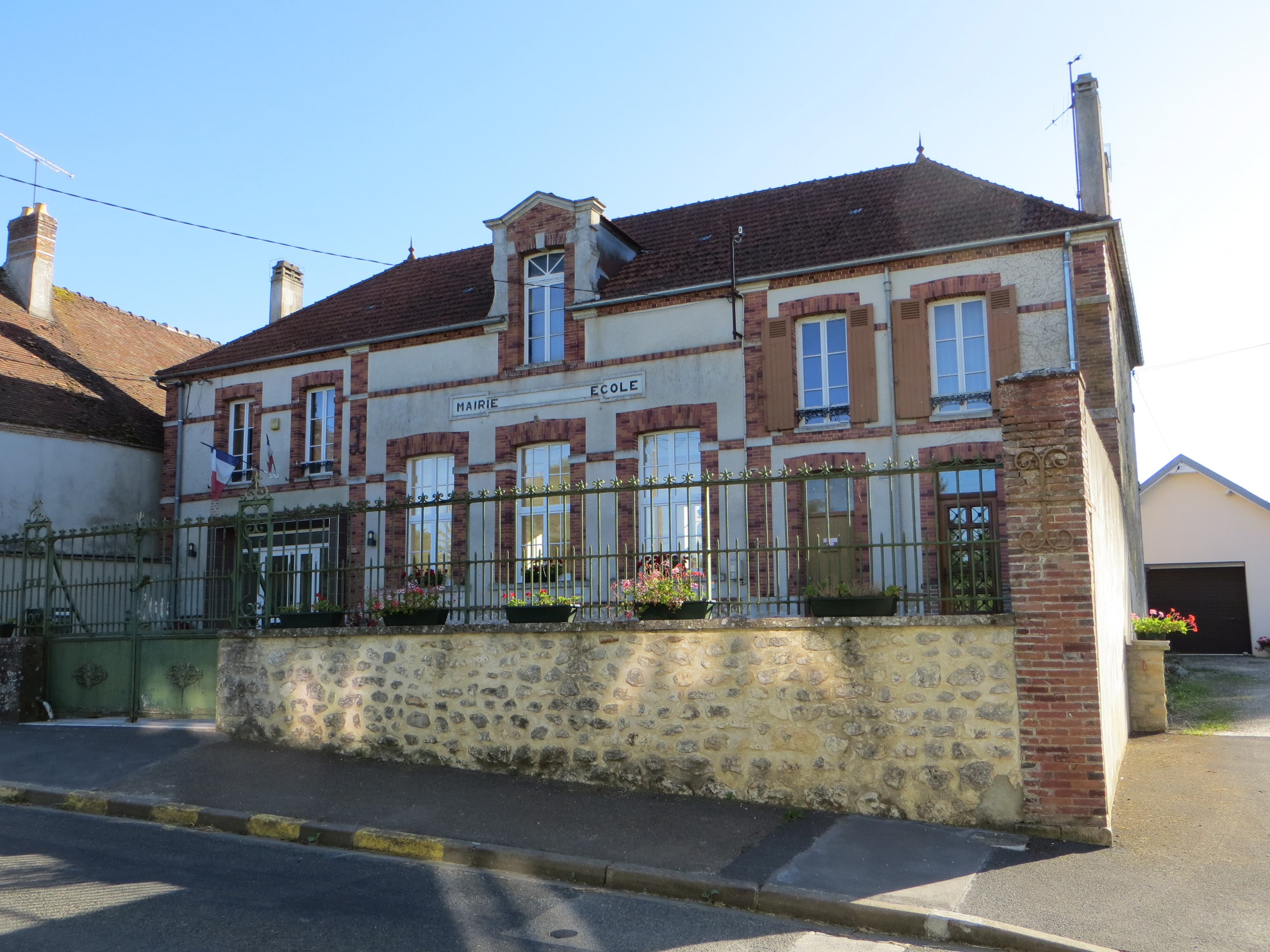 Mairie